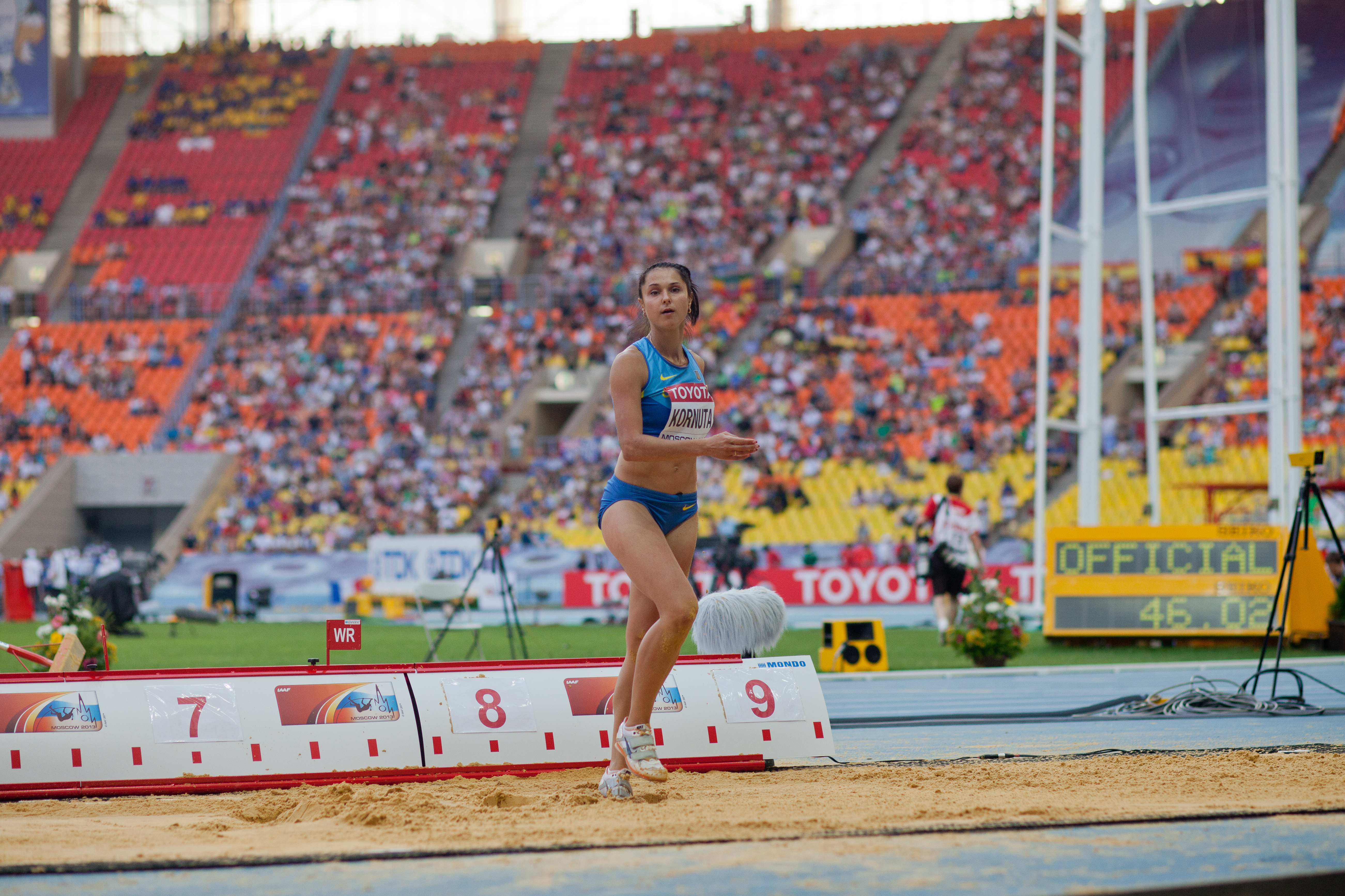 Анна Кормута